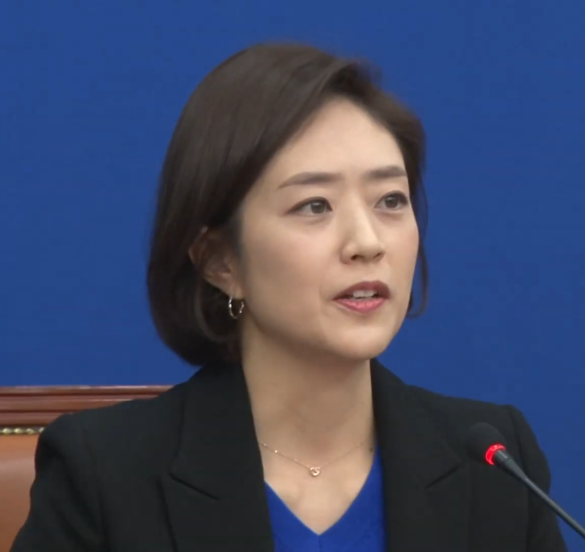 고민정 전 청와대 대변인이 더불어민주당 입당식에서 기념사를 발언하고 있다.